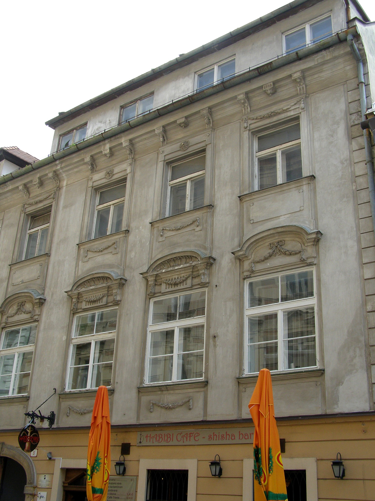 Panská ul. č. 9 Object location48° 08′ 33.36″ N, 17° 06′ 29.52″ E